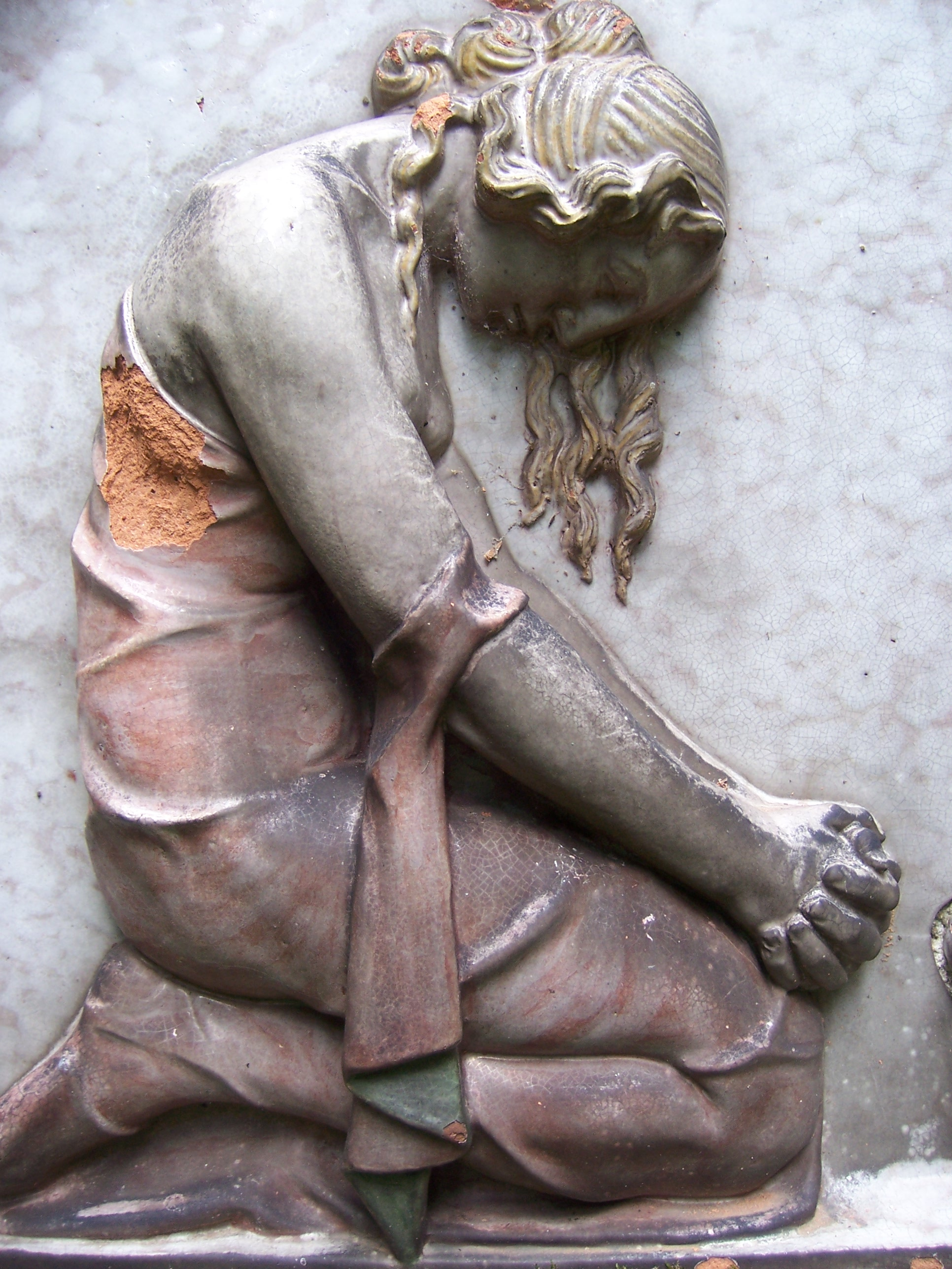 Alfred Thiele: Detail Majolikarelief 1920, Grabstätte Degener, Südfriedhof Leipzig